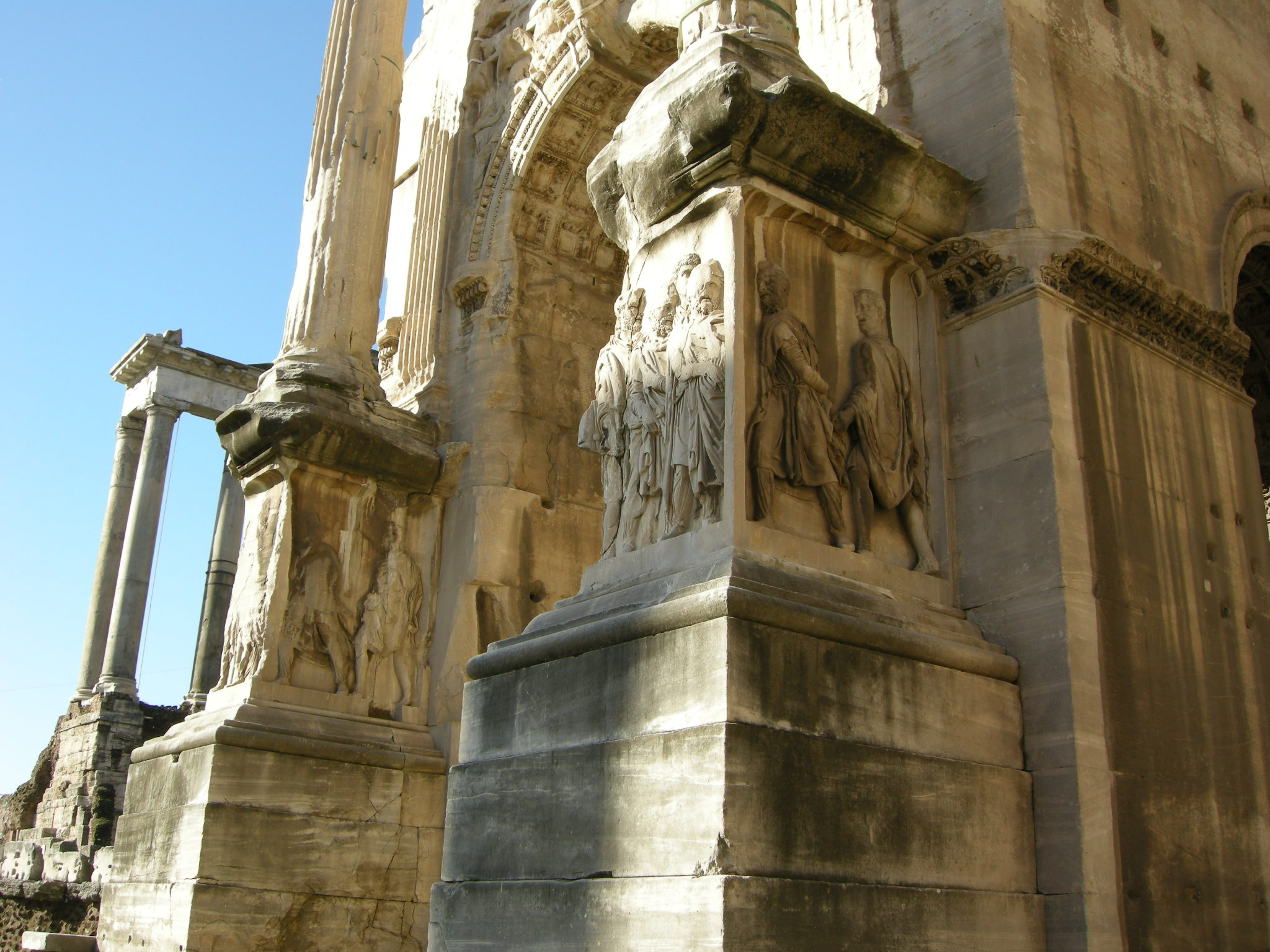 Arco di settimio severo, plinti